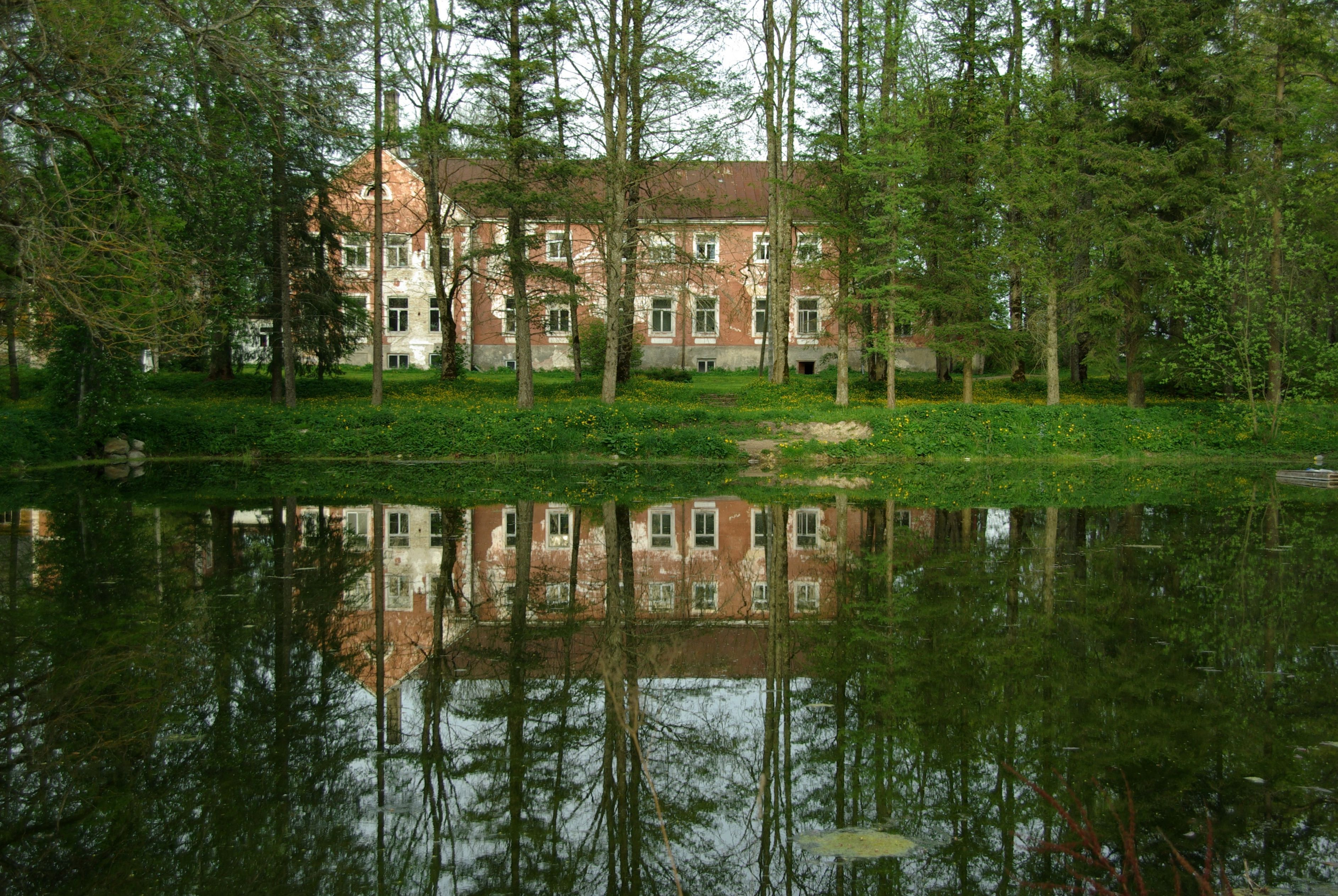 mõis Roosna-Alliku vallas Järva maakonnas